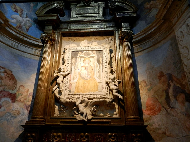 Varese - Madonna in trono col Bambino (secolo XV) all'interno del Santuario della Madonnina in Prato